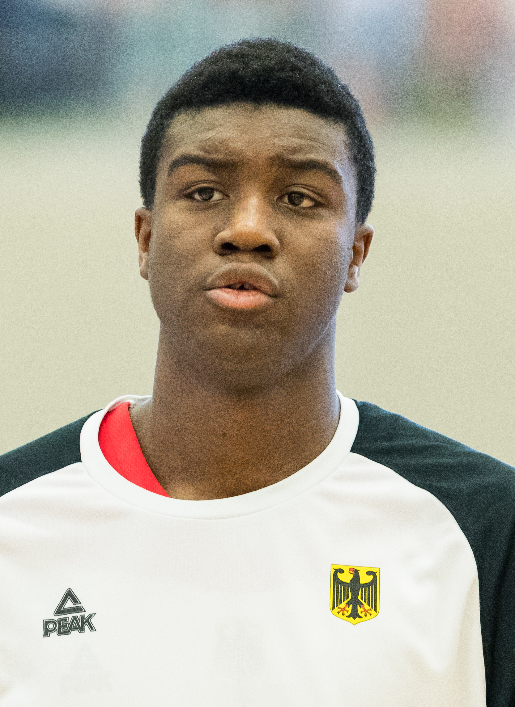 Australia vs Germany 66:88 during final Basketball Albert Schweitzer Turnier at GBG Halle, Mannheim, Baden-Württemberg, Germany on 2018-04-07, Photo: Sven Mandel